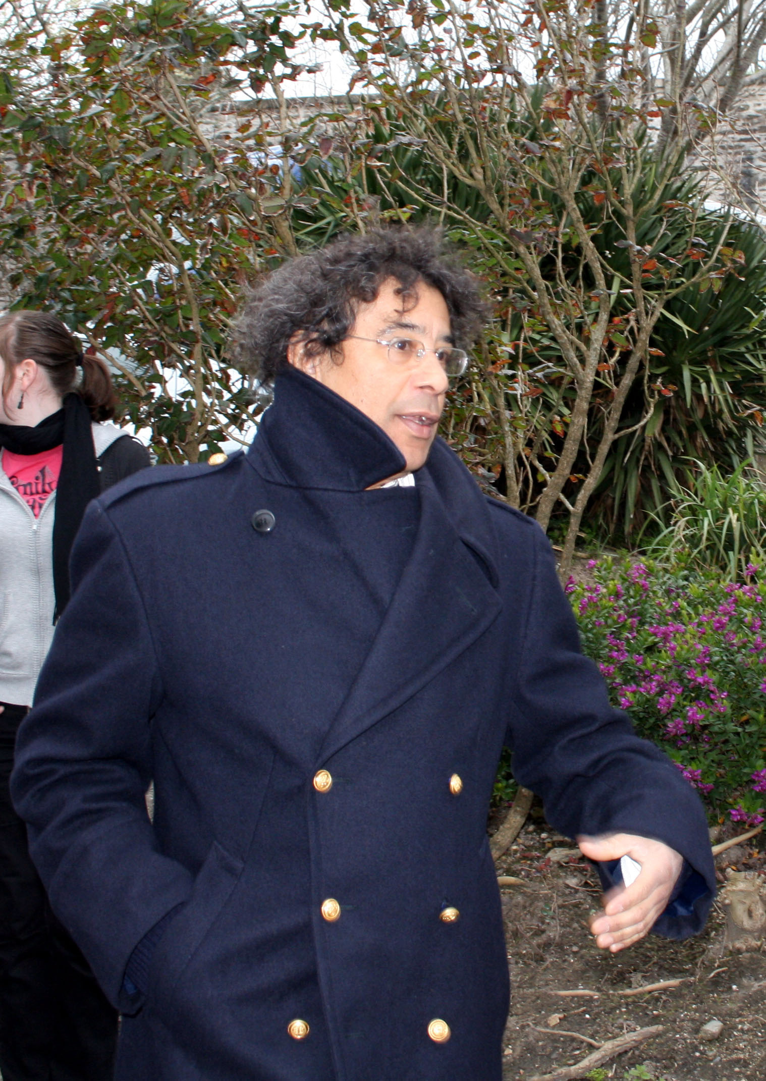 Description =Laurent Voulzy à Belle-Ile lors du Trophée BPE Source =Photo taken by Remi Jouan Date =Mars 2007 Author =Remi Jouan